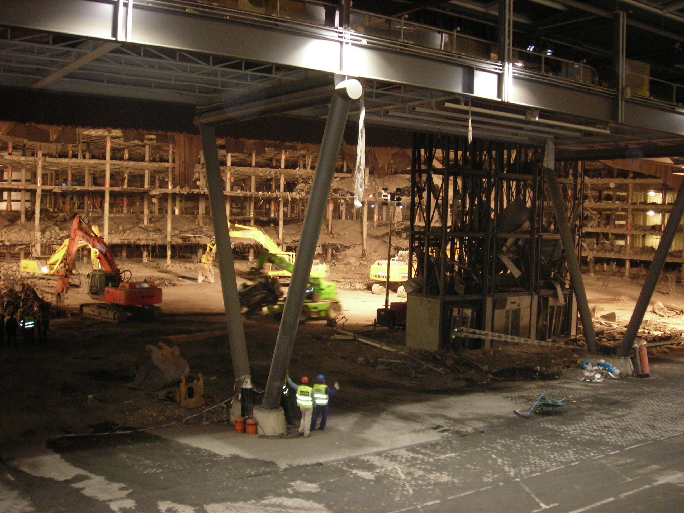 Párking de la T4 (Madrid-Barajas) días después del atentado de ETA del 30 de diciembre de 2006